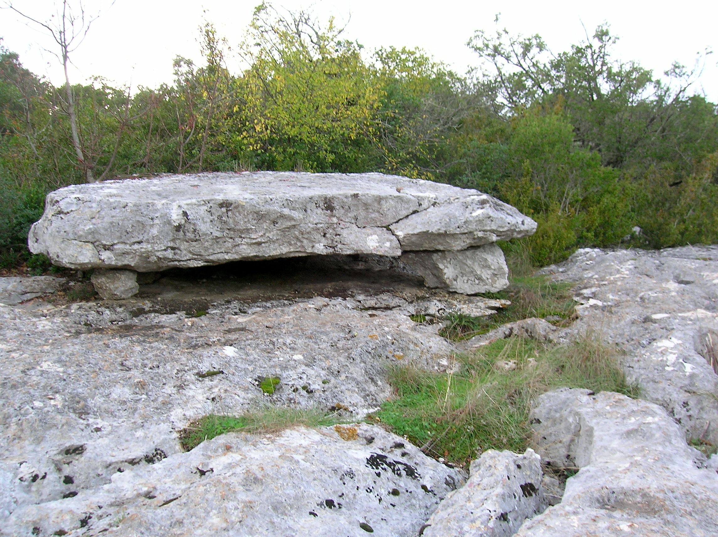 garrigue et site de la Table des Turcs, Méjannes-le-Clap, Gard, Languedoc-Roussillon-Midi-Pyrénées, France.